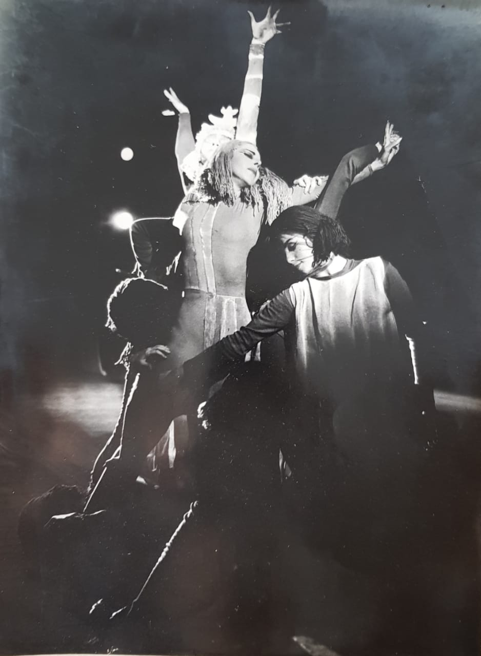 Elsa Galvez como Zuimaaluti